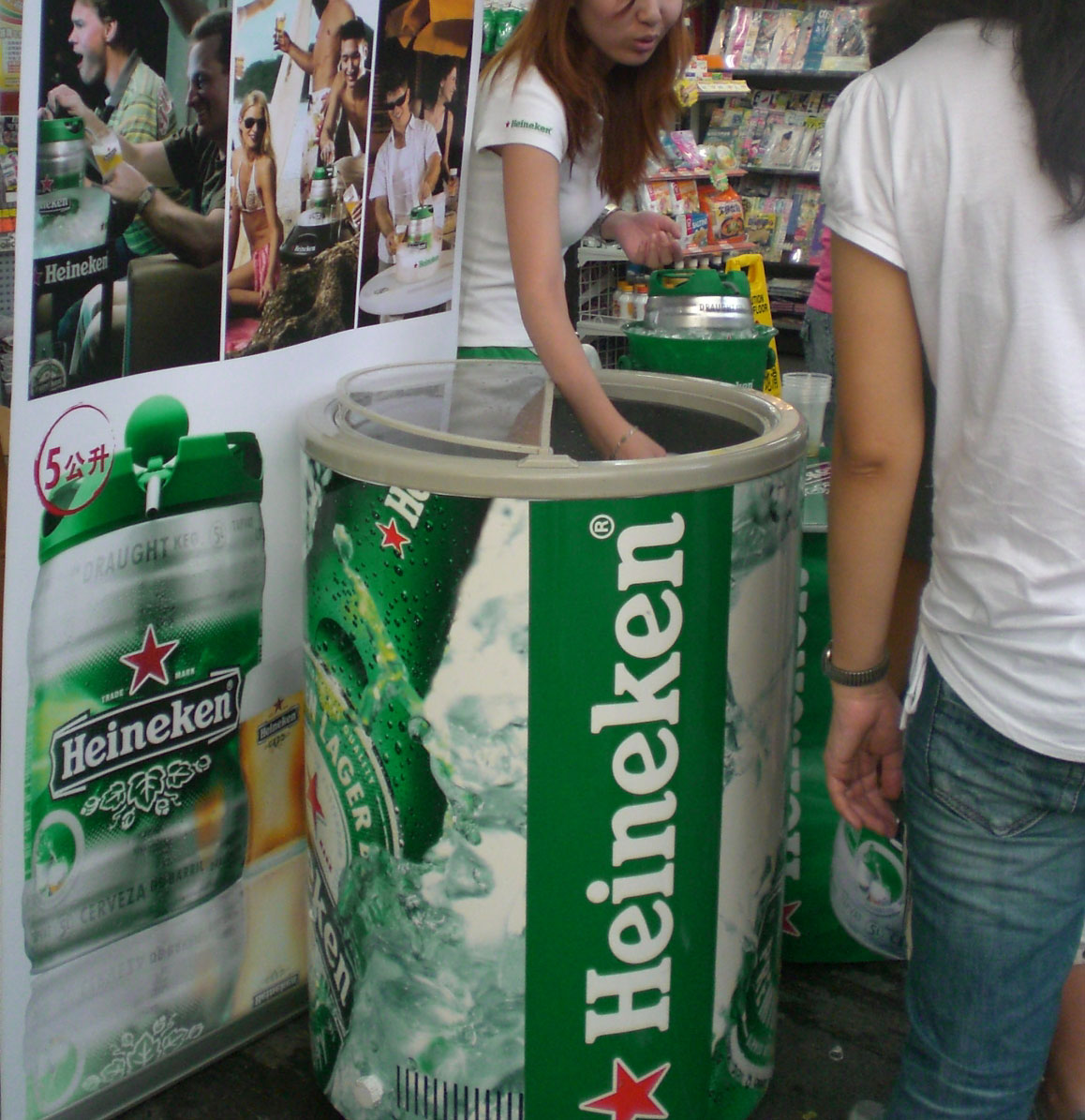 海尼根啤酒啤酒推銷員在沙田大圍路演推介品牌啤酒